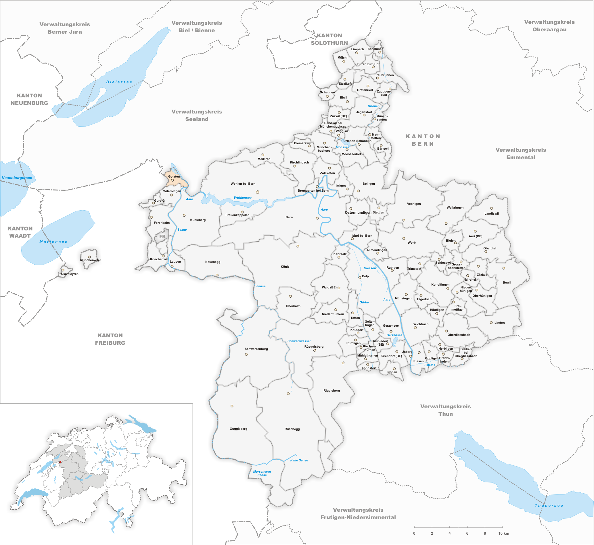 Municipality Belp